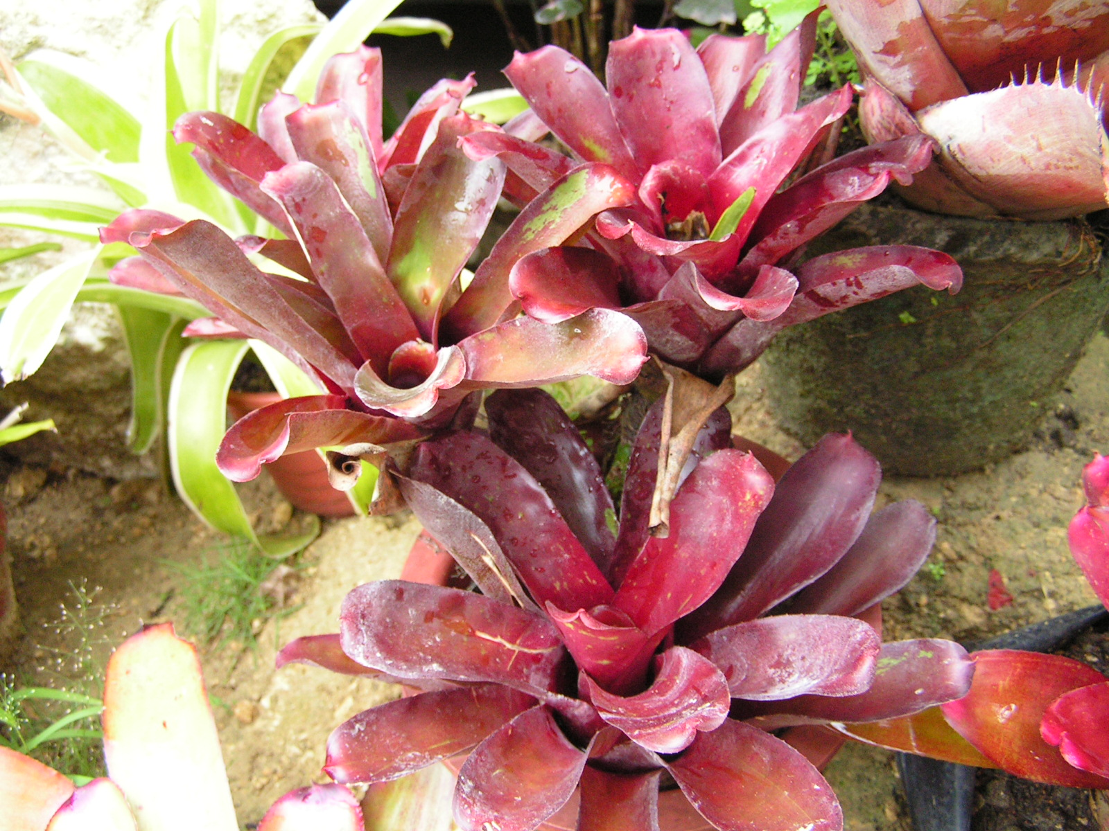 Bromeliad 3